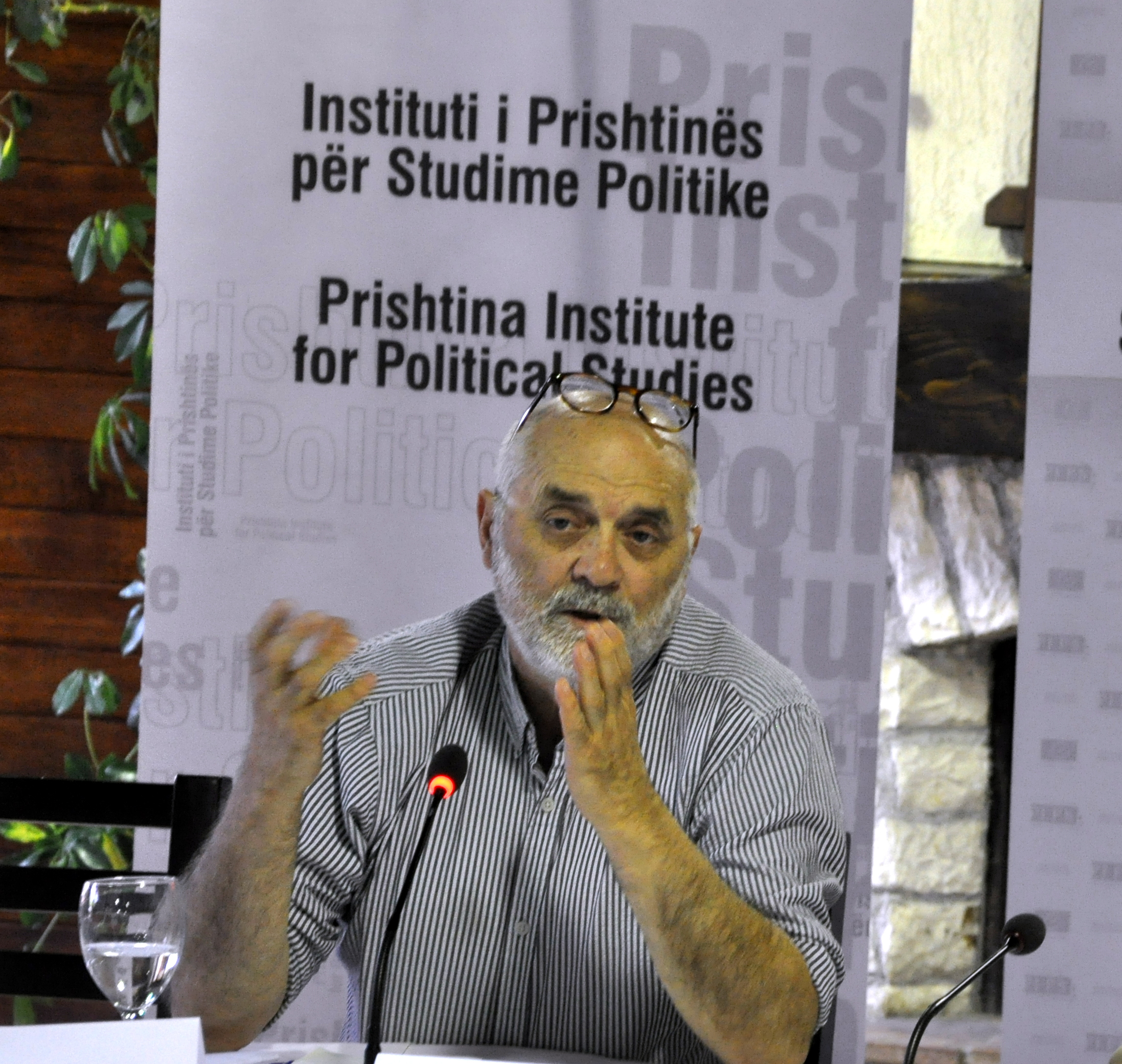 Shkëlzen Maliqi